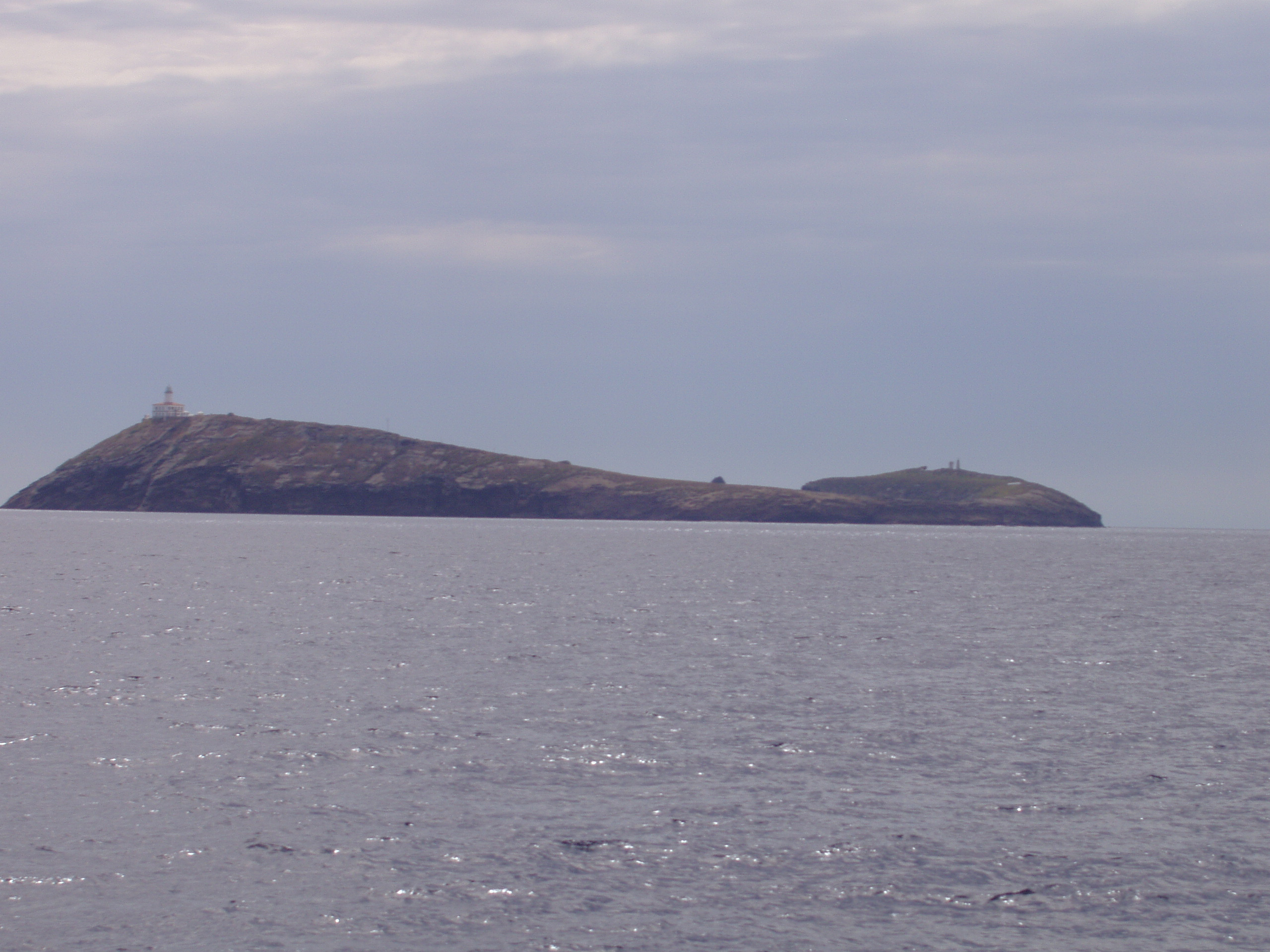 Islas Columbretes This is a photography of a Site of Community Importance in Spain with the ID: ES0000061. Natura2000 entry, EEA entry